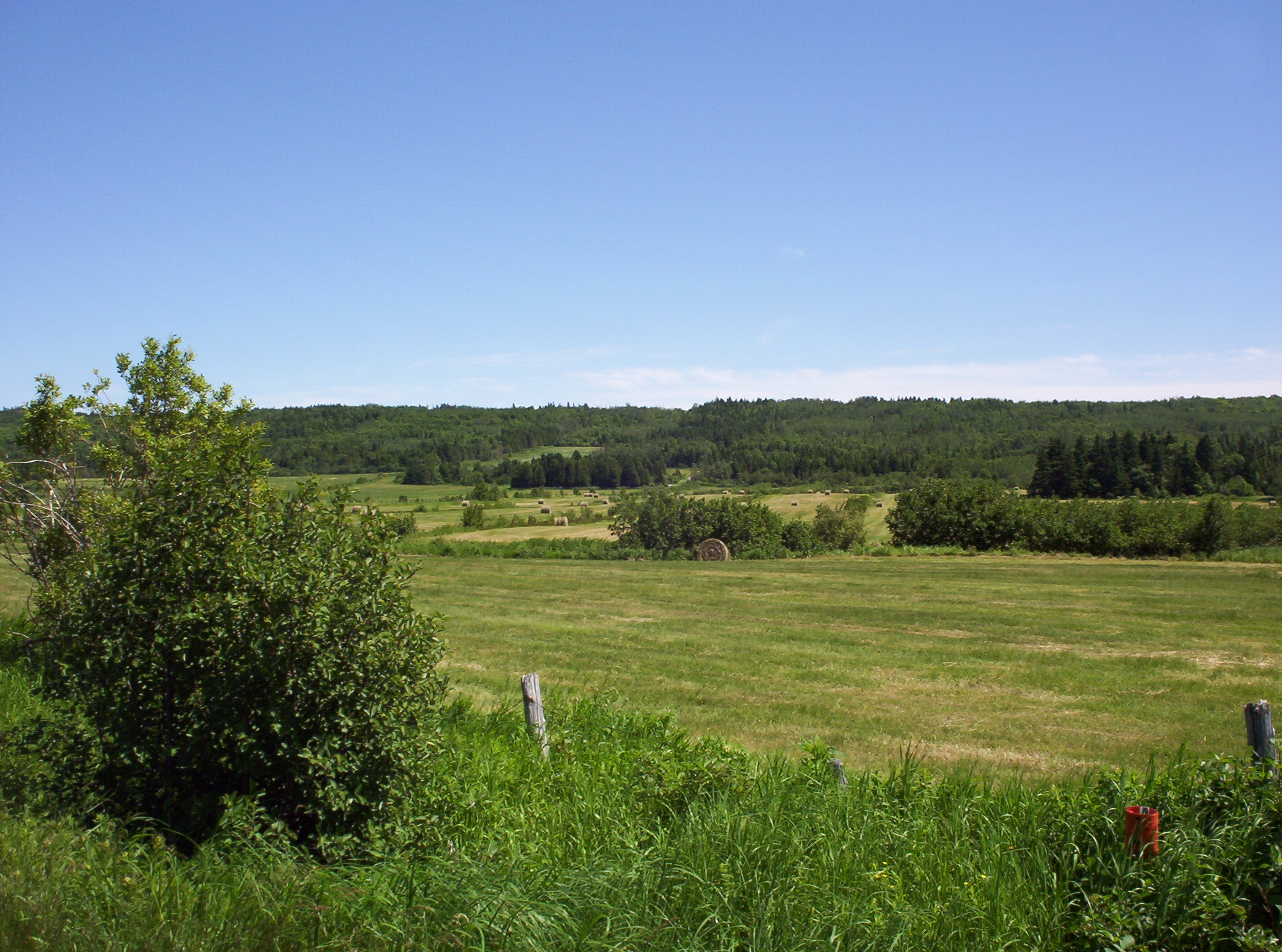 Paisaje agrícola del Bas-Saint-Laurent Provenance: Colocho Paysage agricole du Bas-Saint-Laurent au Québec.